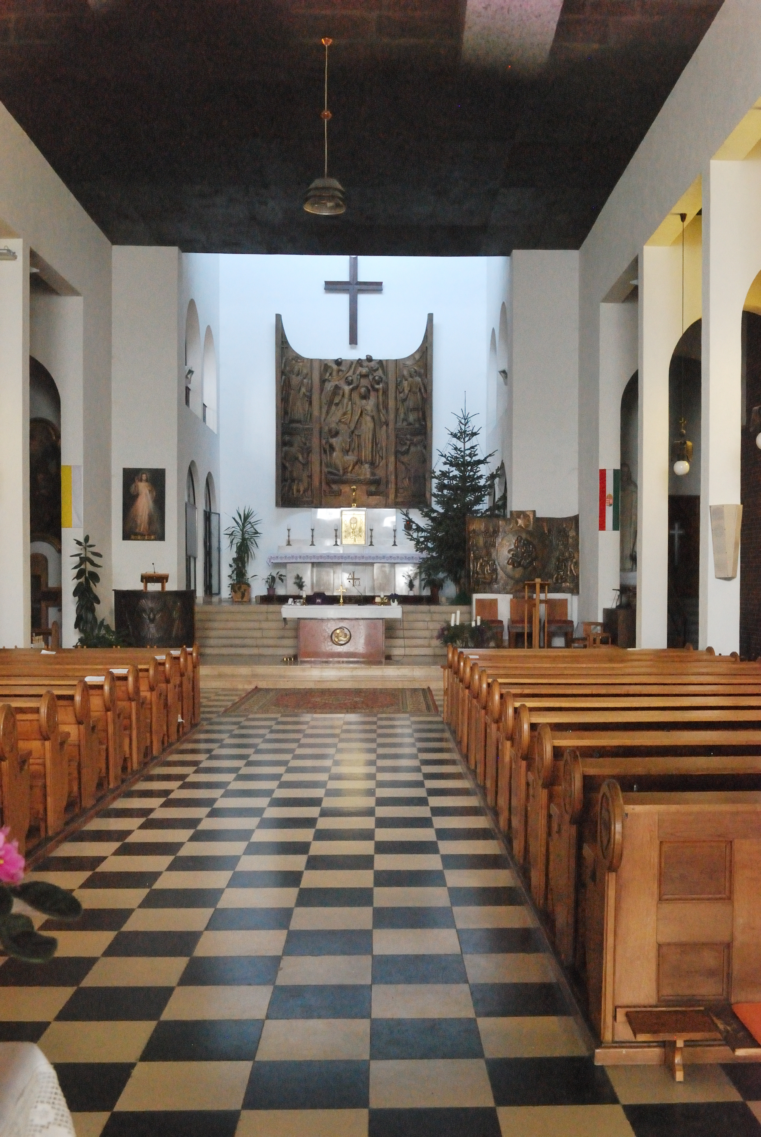 Pécsi pálos templom belső tere